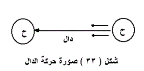 رسم يمثل حركة حرف الدال الممثل في الدائرة على اليمين ثم حين يتحرك الحرف ويصل الى الدائرة على اليسار بواسطة الاسهم تمثل الدائرة على اليسار الحركة الفيزيائية للحرف